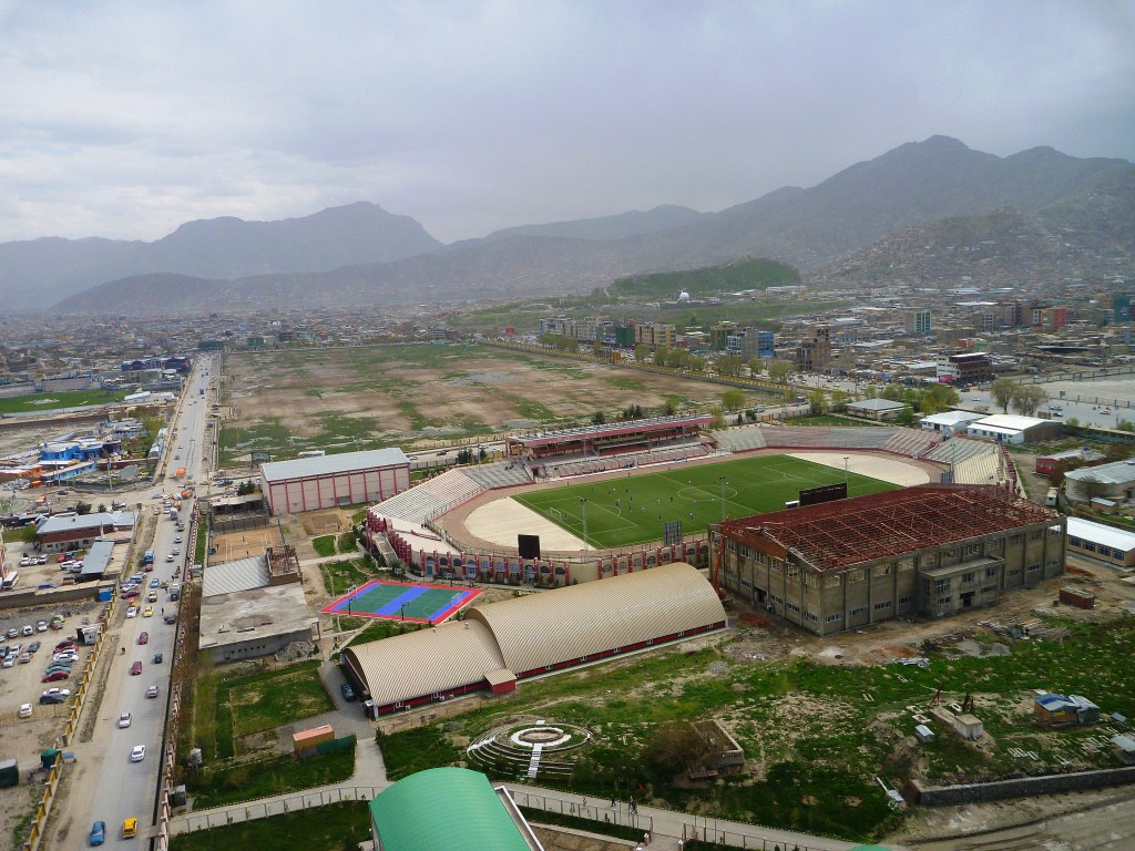 Ghazi Stadium